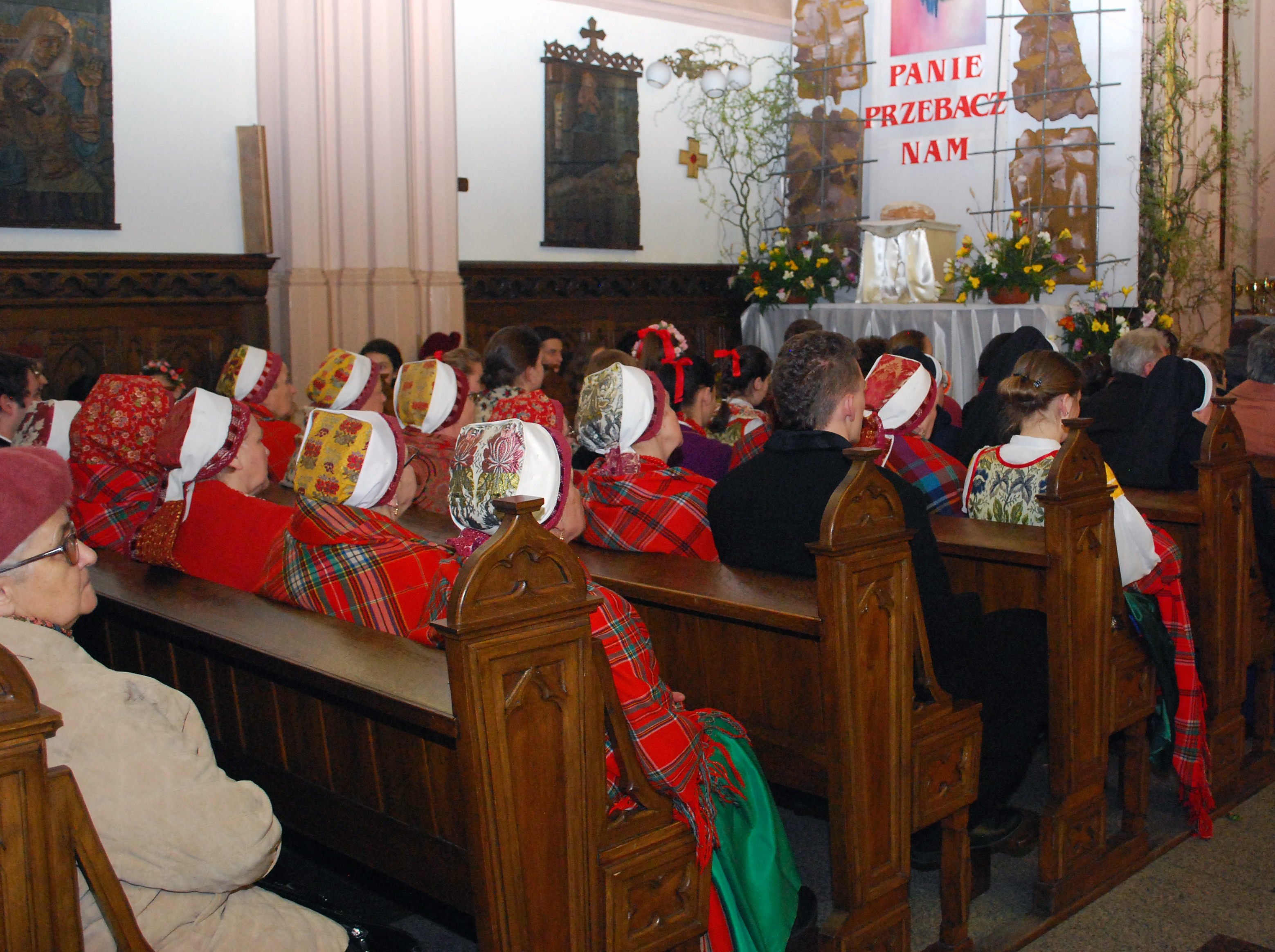 Wigila Paschalna w Wilamowicach - procesja - Wilamowianie w kościele